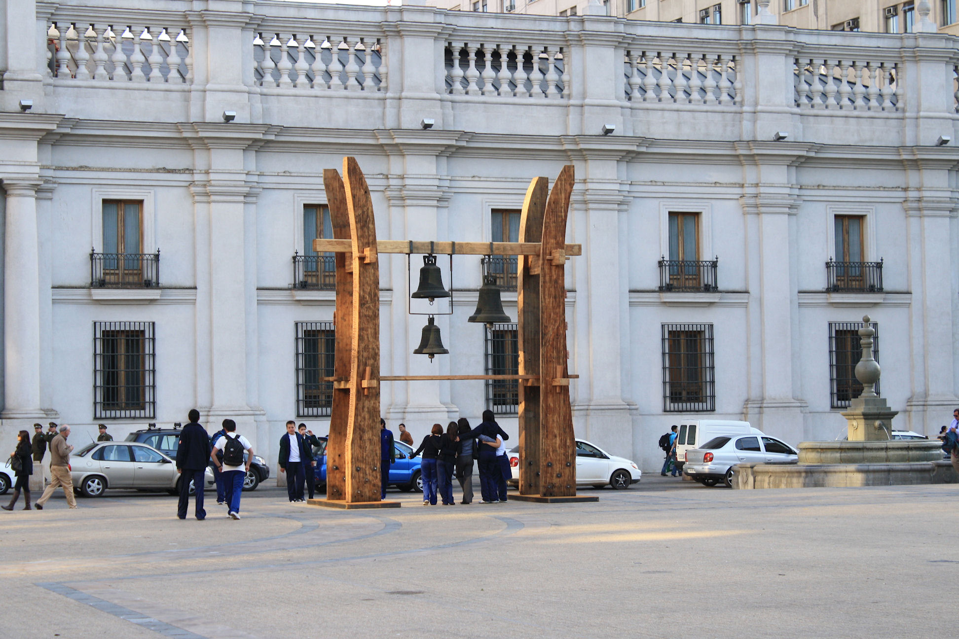 Bells in Plaza de Armas, Santiago